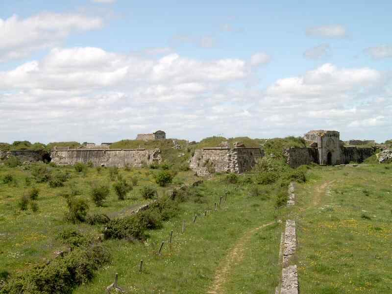 Camino cubierto, entre las Caballerizas y el Castillo.